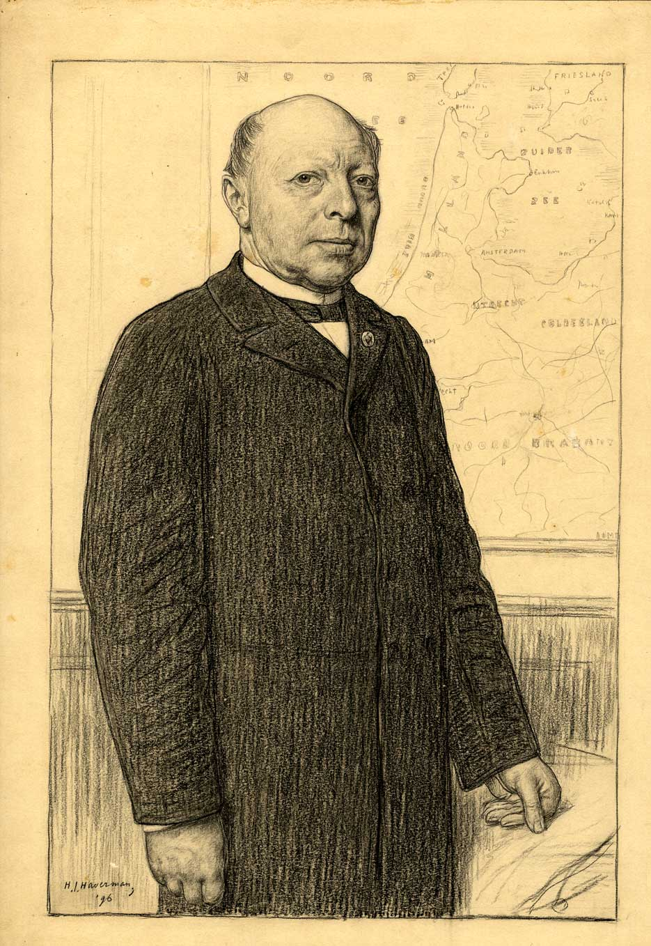 J.F.W. Conrad (1825-1902)